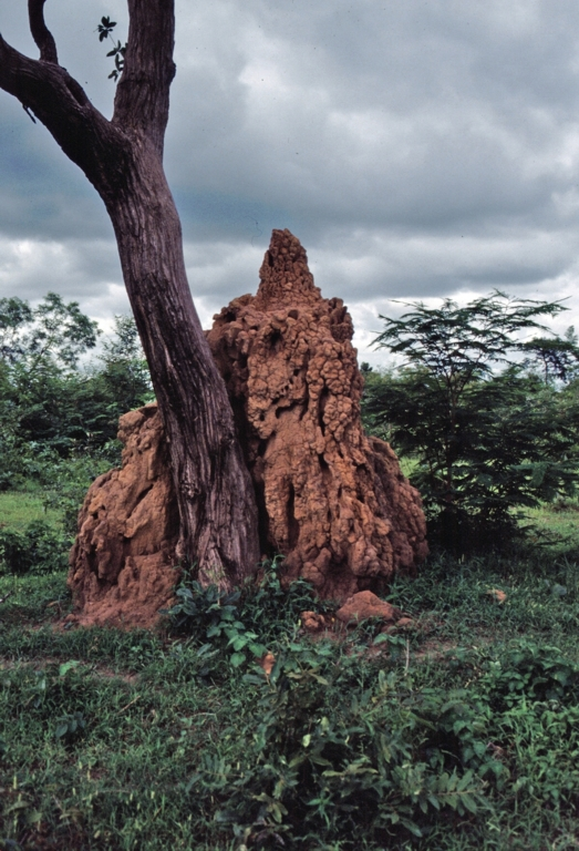 Termitenhügel in der Waldsavanne in der Nähe der Lamin Lodge